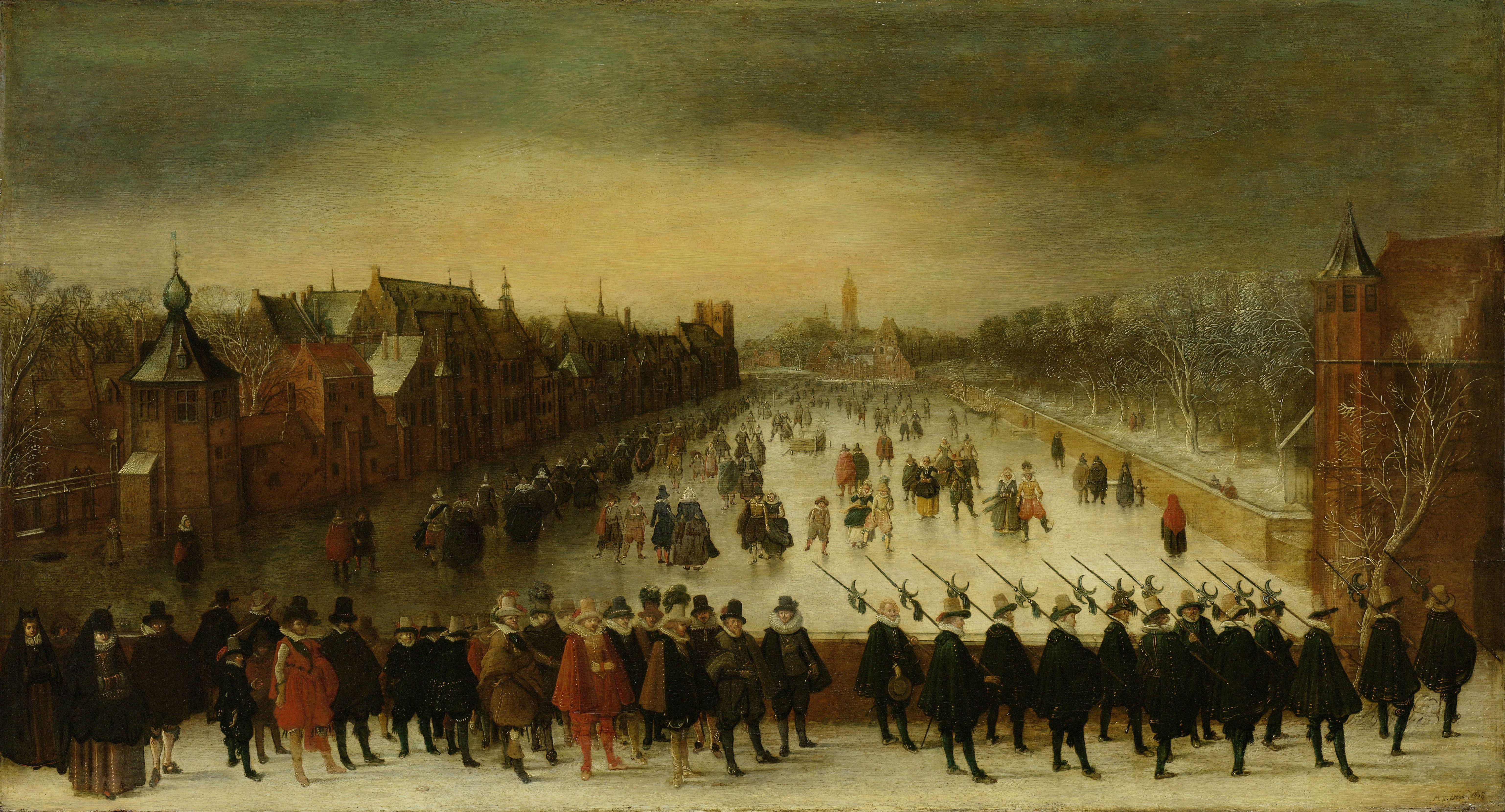 Wintergezicht met ijsvermaak op de Vijverberg te Den Haag en op de voorgrond prins Maurits en Frederik Hendrik met gevolg voorafgegaan door een groep hellebaardiers. Links de gebouwen van het Binnenhof.